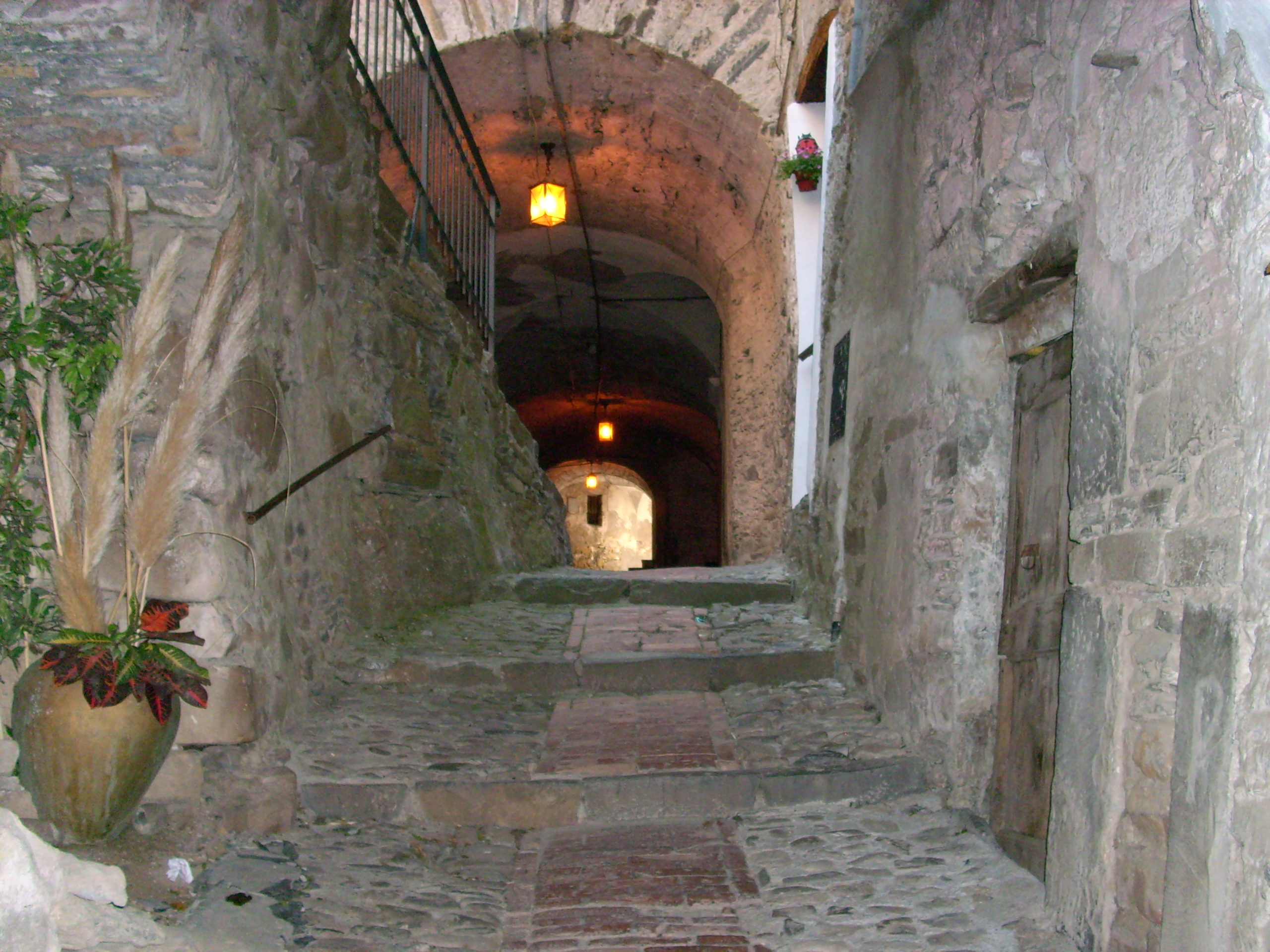 Montalto Ligure, Liguria, Italia